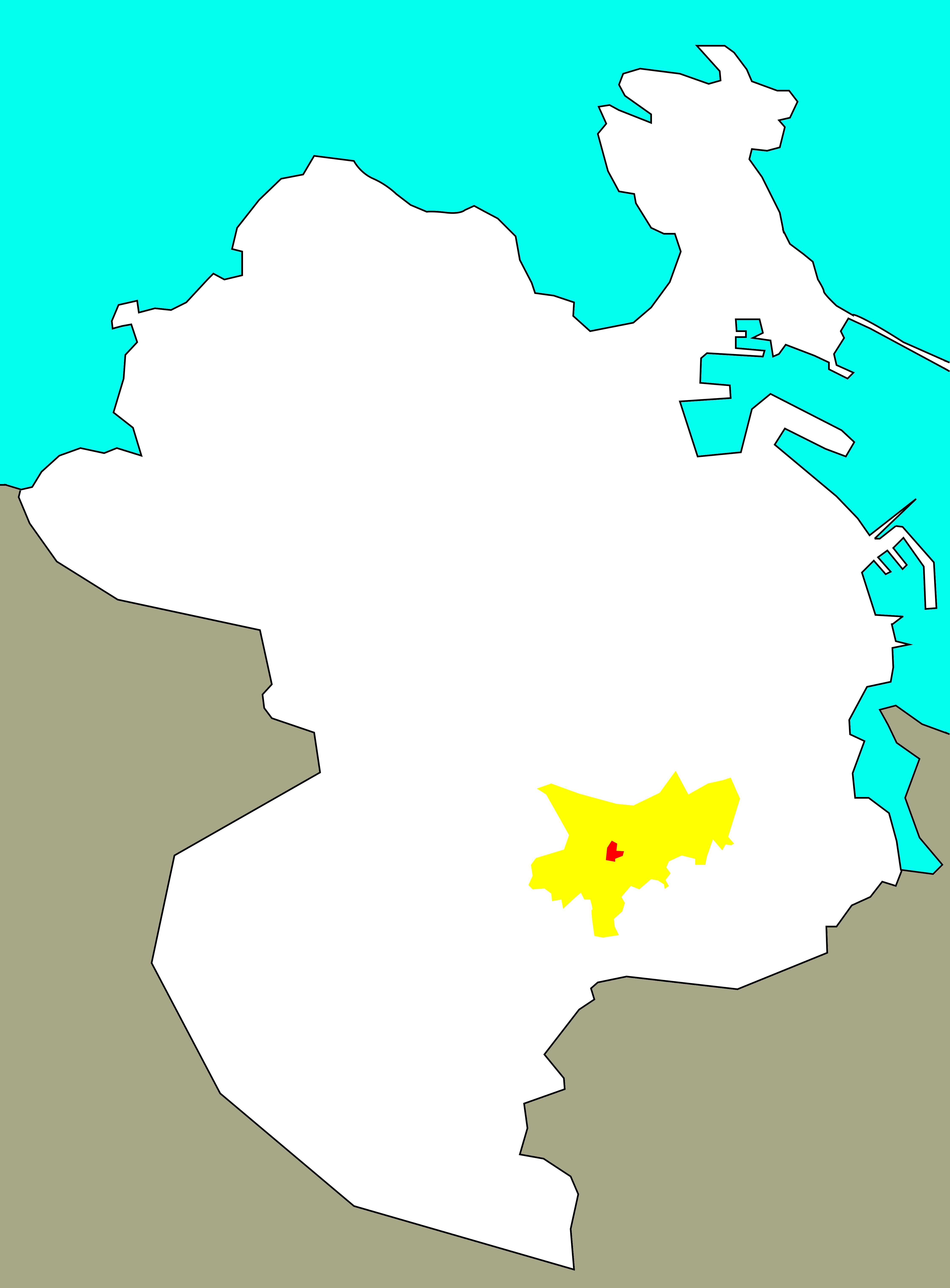 Situación do Lagar no "barrio-territorio" de Elviña, segundo